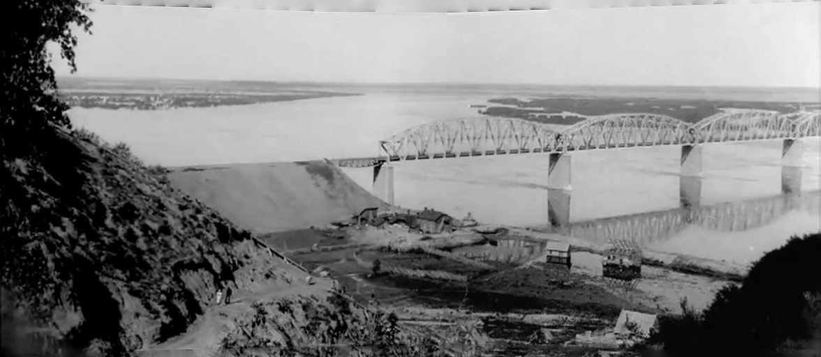 Железнодорожный мост в Барнауле. Склейка из кадров кинохроники 1919 в Image Composite Editor.